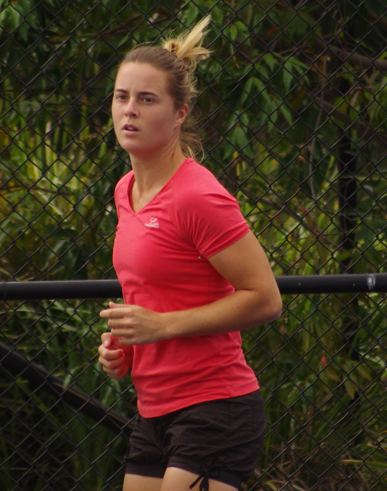 Anastasiya Yakimova